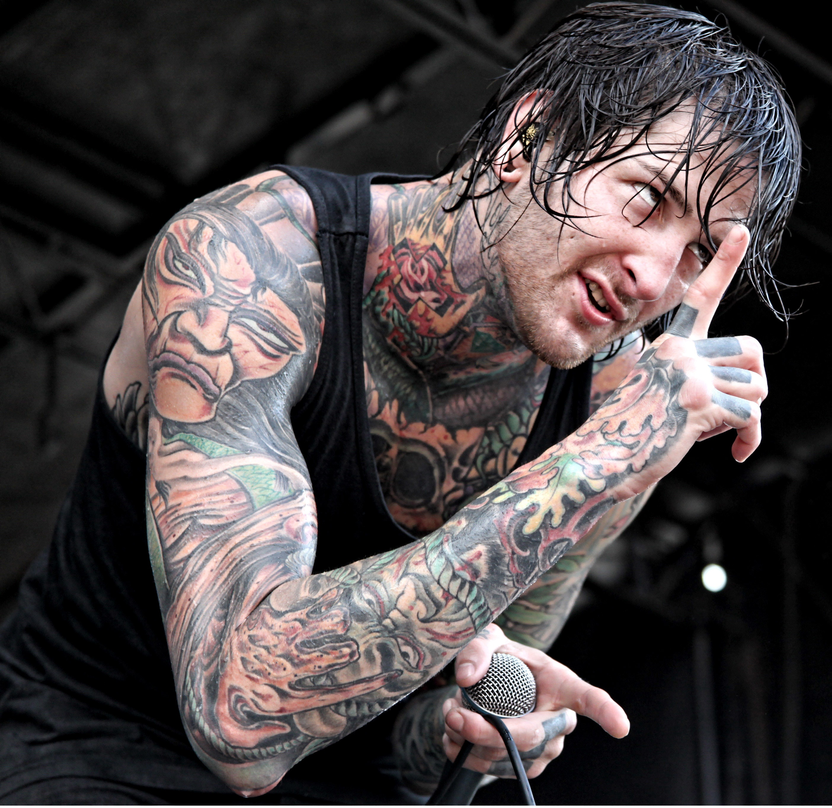 Suicide Silence - Rockstar Mayhem Festival 2011 West Palm Beach